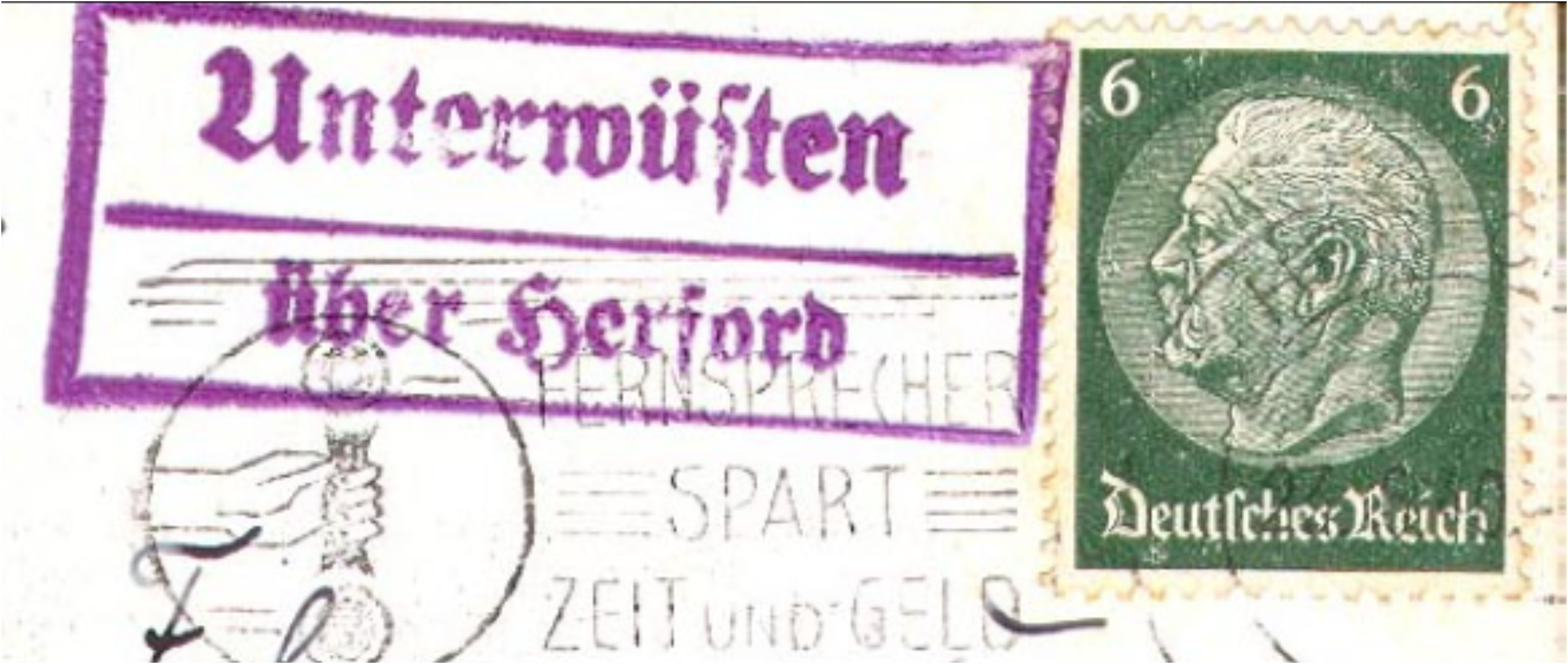 Deutschland (D) - Nordrhein-Westfalen (NW) - Kreis Lippe (LIP) - Bad Salzuflen - Wüsten: Posthilfstelle-Stempel "Unterwüsten über Herford", 23. Juni 1940